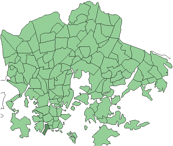 Districts of Helsinki, Munkkisaari highlighted (in Finnish: Helsingin kaupunginosat, Munkkisaaren osa-alue korostettuna)